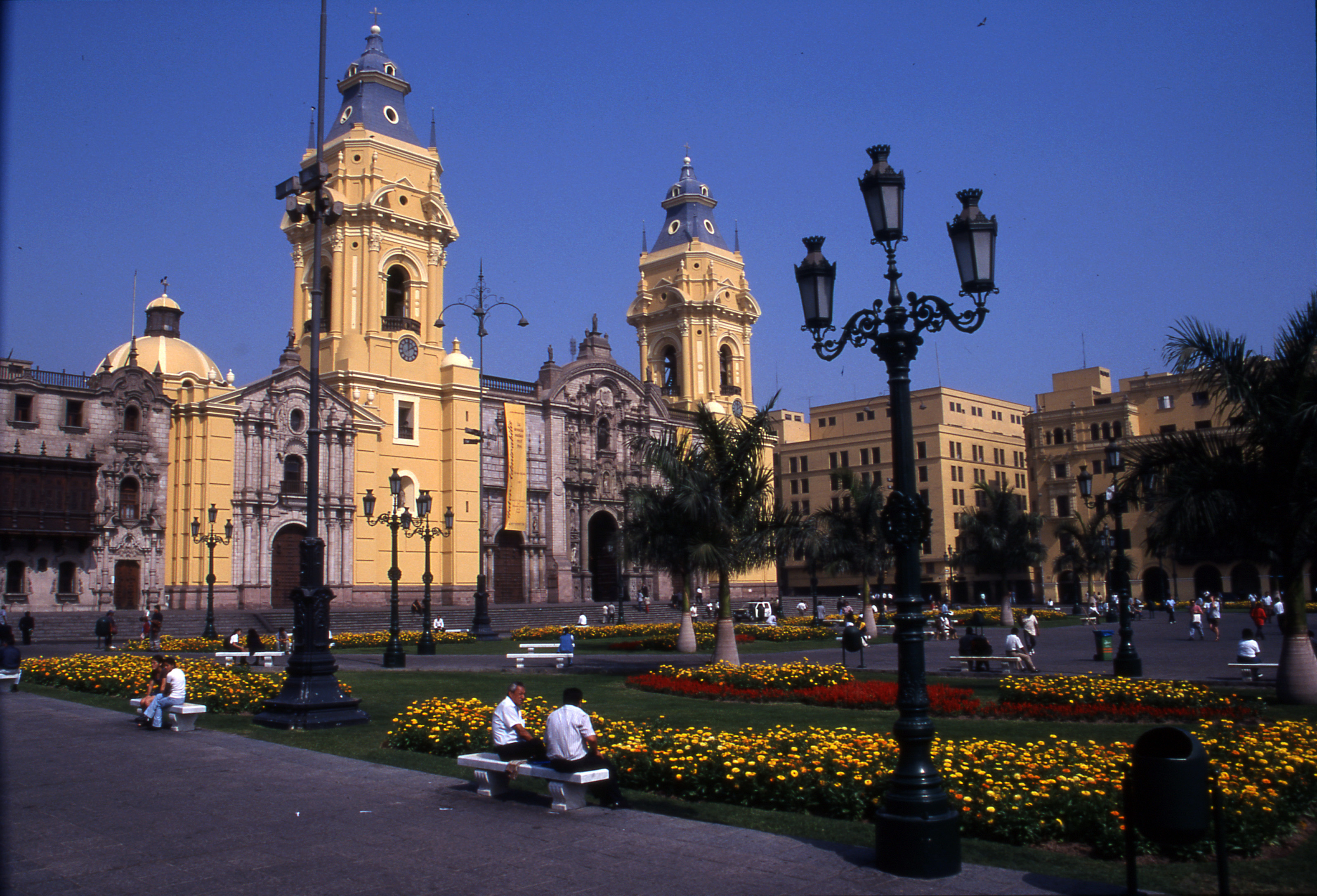 Perou Lima place du palais royal